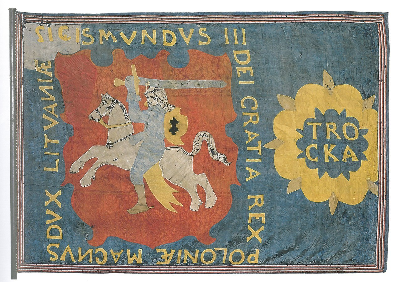 Беларуская (тарашкевіца): Харугва Троцкага павету (Troki) з Пагоняй (Pahonia)